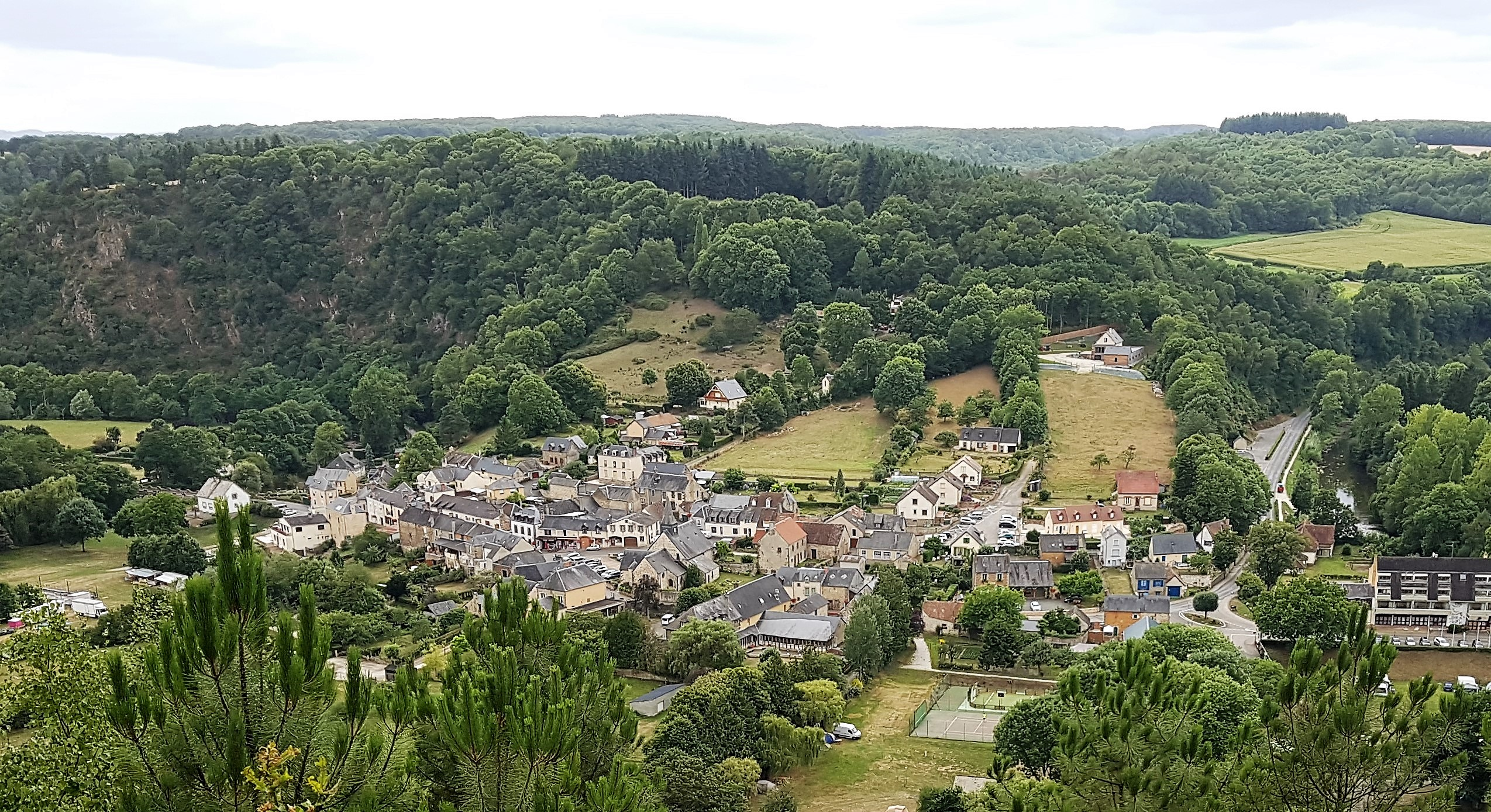 Saint-Léonard-des-bois du Haut-Fourché, 2017